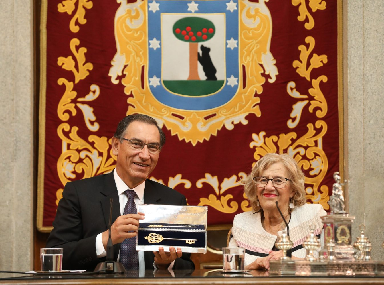 La alcaldesa entrega la Llave de Oro de Madrid al presidente de Perú Durante su visita a la Casa de la Villa, en la que Martín Alberto Vizcarra también ha firmado en el Libro de Honor de la ciudad Lima y Madrid están hermanadas desde 1982 y mantienen una estrecha colaboración, sobre todo, a través de la Unión de Ciudades Capitales Iberoamericanas (UCCI) La presencia peruana en Madrid se centra mayoritariamente en los dos distritos vallecanos 27/02/2019